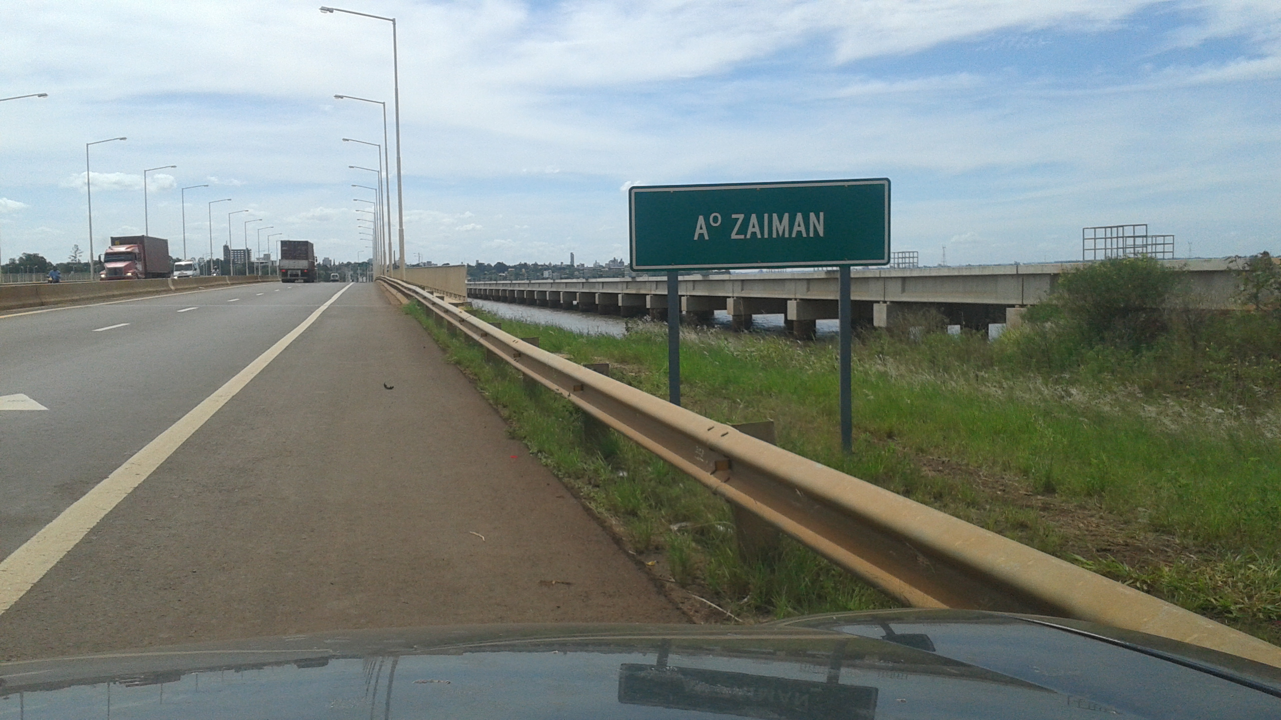 Cartel Arroyo Zaimán (Posadas, Provincia de Misiones, Argentina).